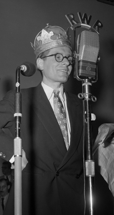 Maxi Böhm als Conférencier der Radiosendung Schach dem König im Wiener Schwechater Hof (Übertragung von Radio Rot-Weiß-Rot)